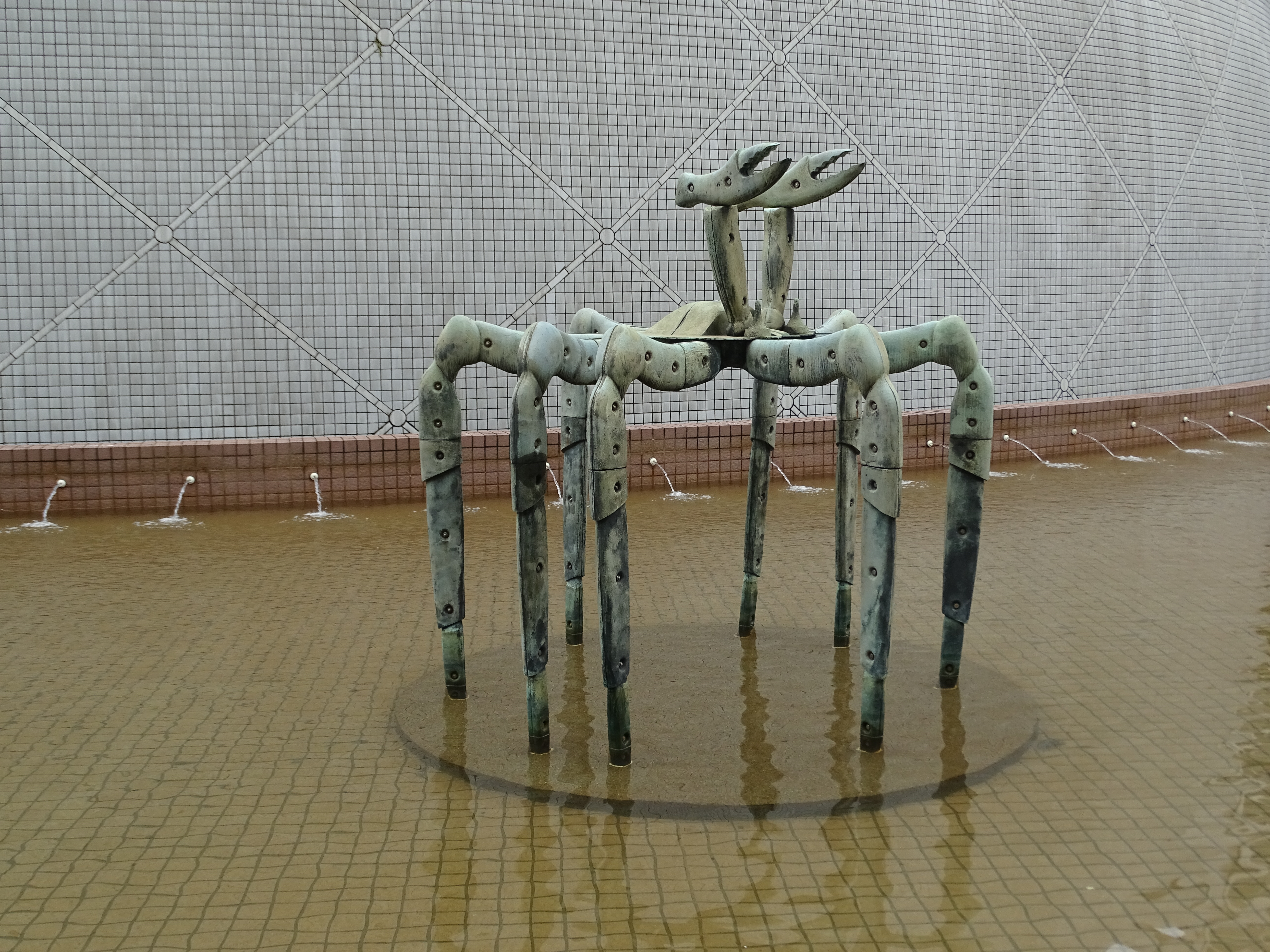 Crab No. 1 伏波將軍 (1984, Bronze, Höhe 4.5 m), Art Square at Salisbury Garden / Hong Kong Cultural Centre Complex HKCCC, im Hintergrund das Hong Kong Space Museum, Kowloon, Hong Kong